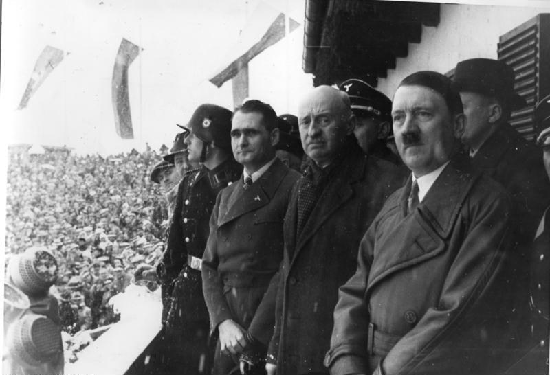 Eröffnung der IV. Winterolympiade. Der Führer, Baillet-Latour, Rudolf Hess